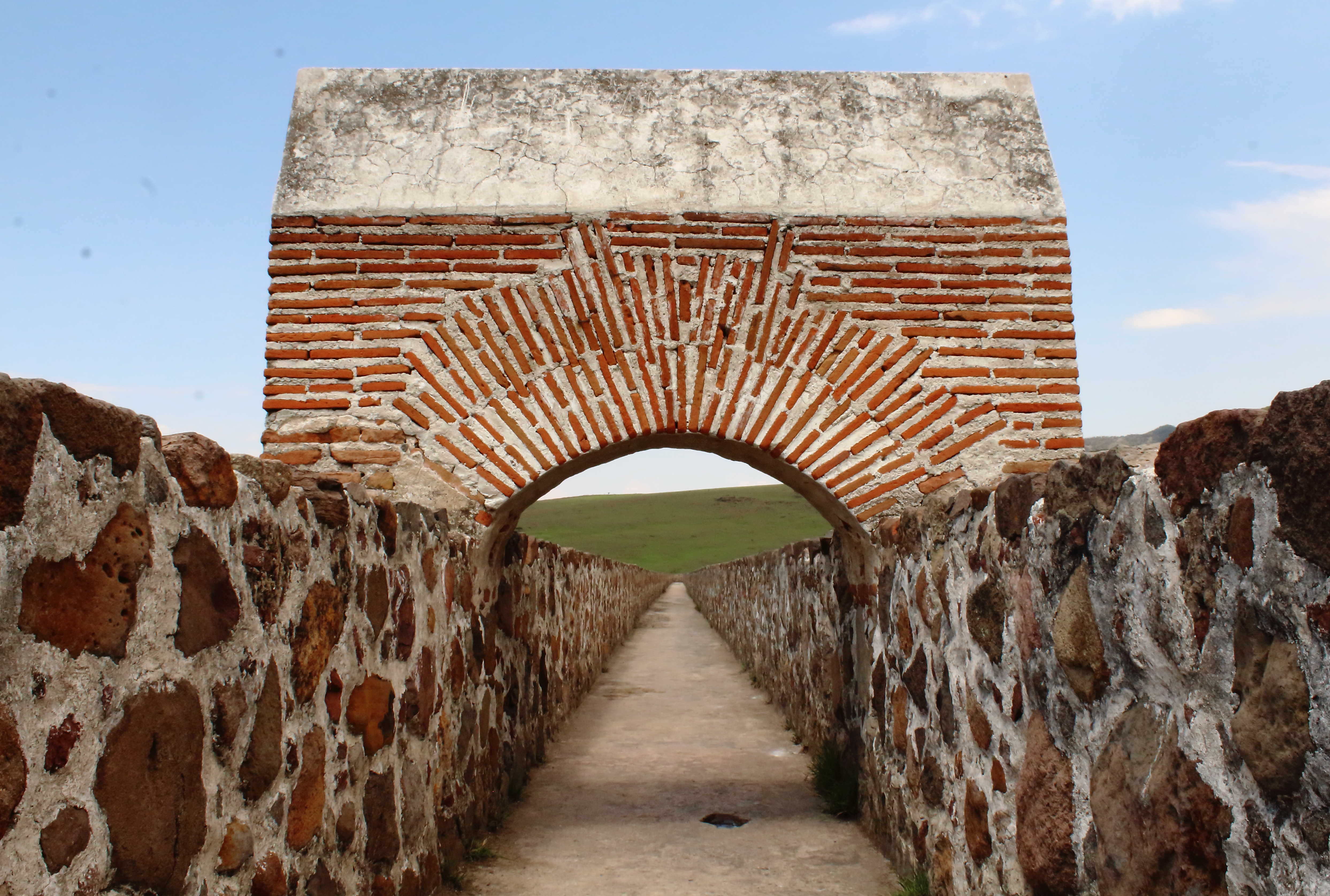 Vista del acueducto de Tepotzotlán, conocido comúnmente como "Los arcos de Xalpa".